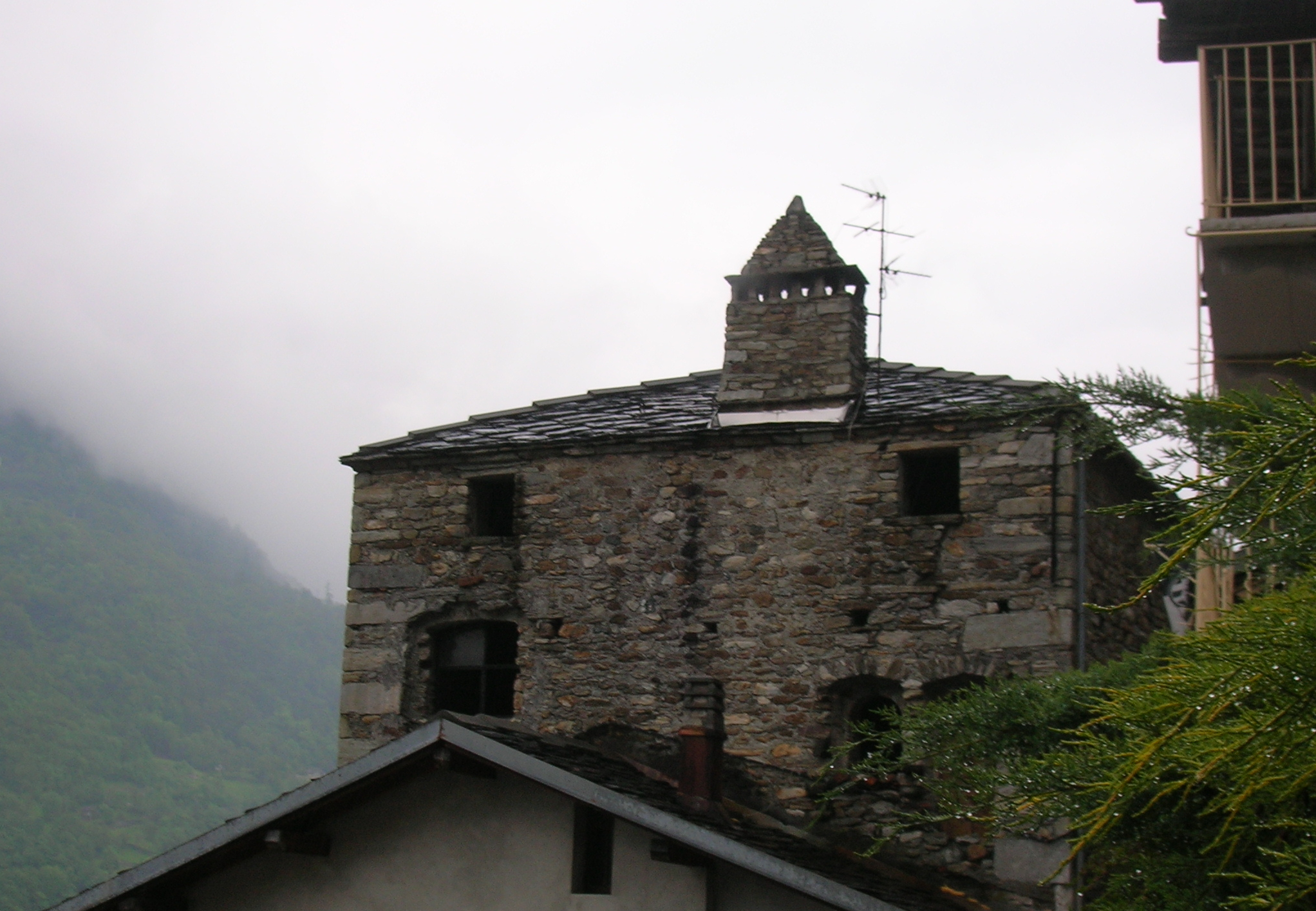 Visione laterale del Castello dei Vallaise a Perloz, Valle d'Aosta, Italia.